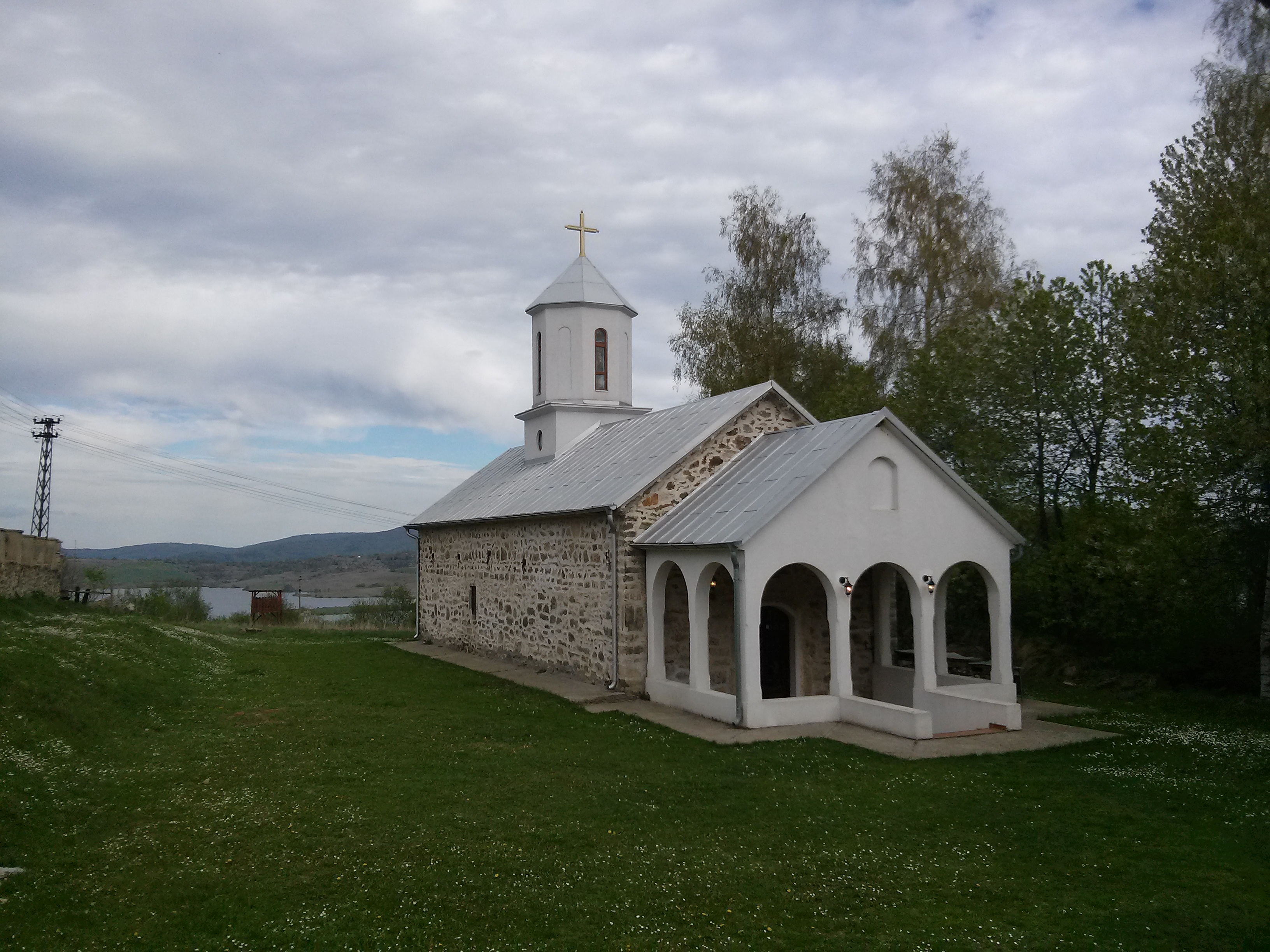 Srpski (latinica): Crkva Svetog Ilije, Vlasina Rid